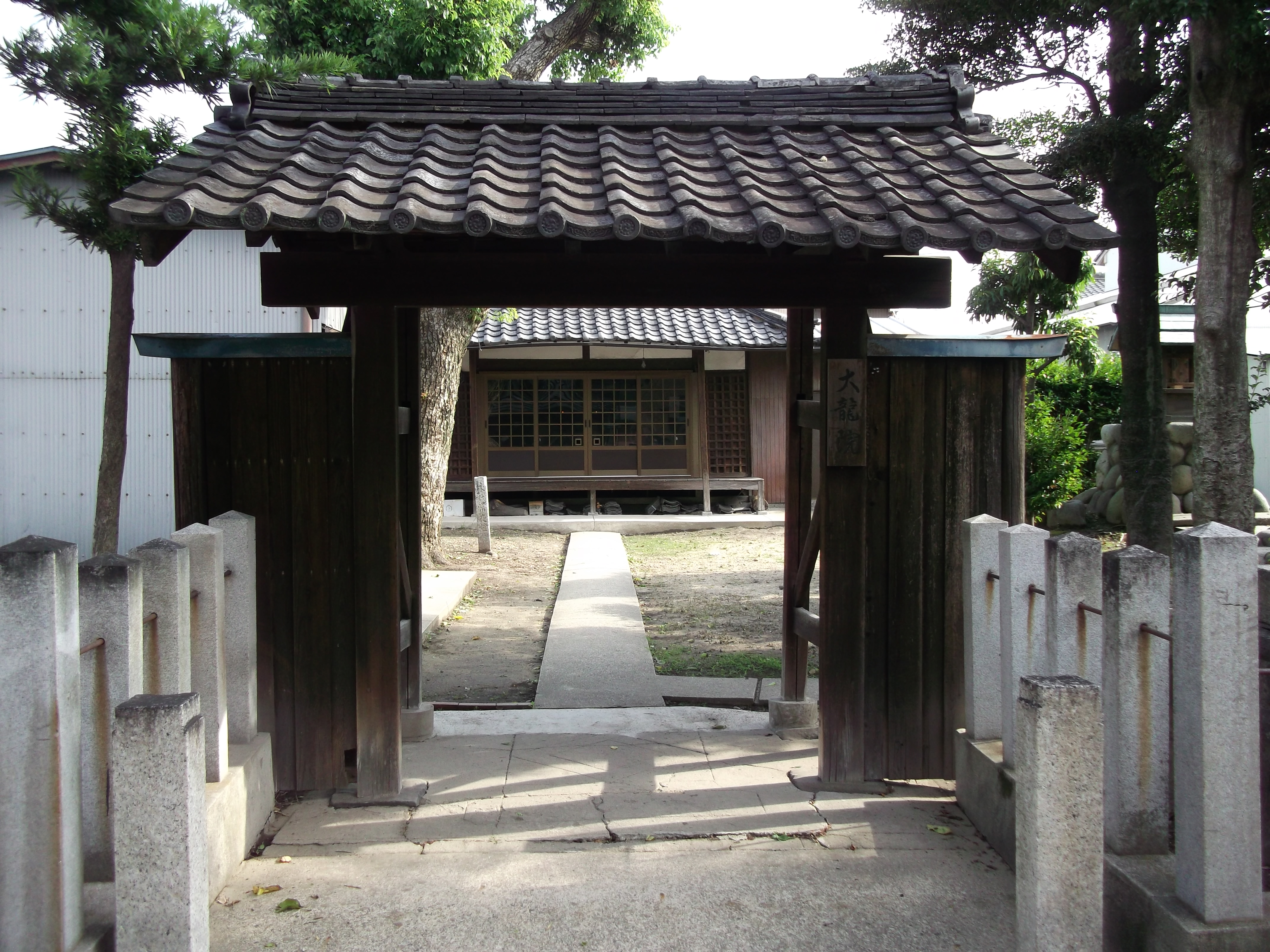 名古屋市北区光音寺町にある大龍院を南側公道より撮影